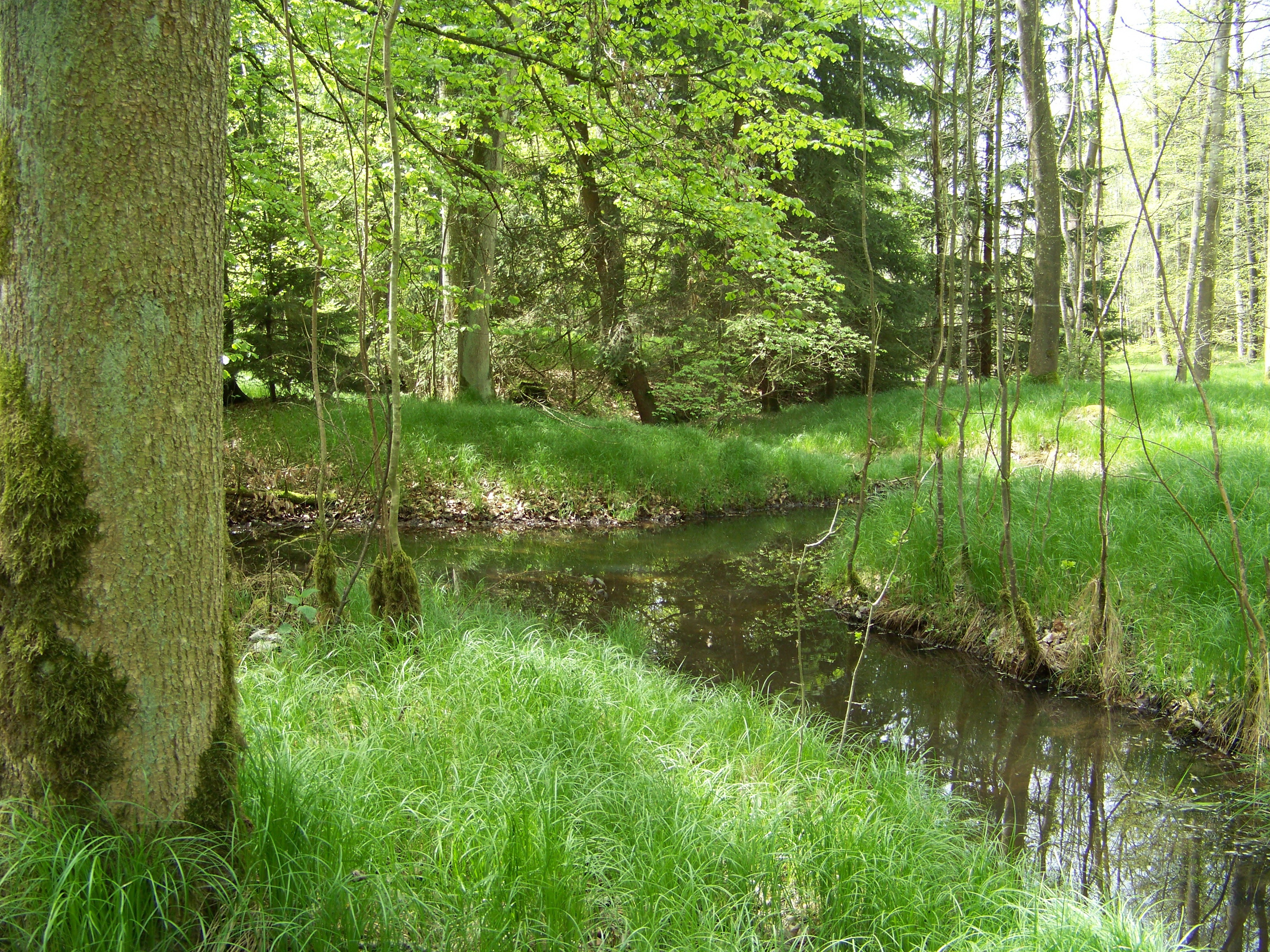 Laberweinting, Hofkirchen, Ellenbach. Kleiner Bachlauf aus den Wäldern am Poschenhof. Der Ellenbach mündet in Osterham in den Bayerbacher-Bach. Biberdämme stauen das Wasser an und verbreitern den Bachlauf.